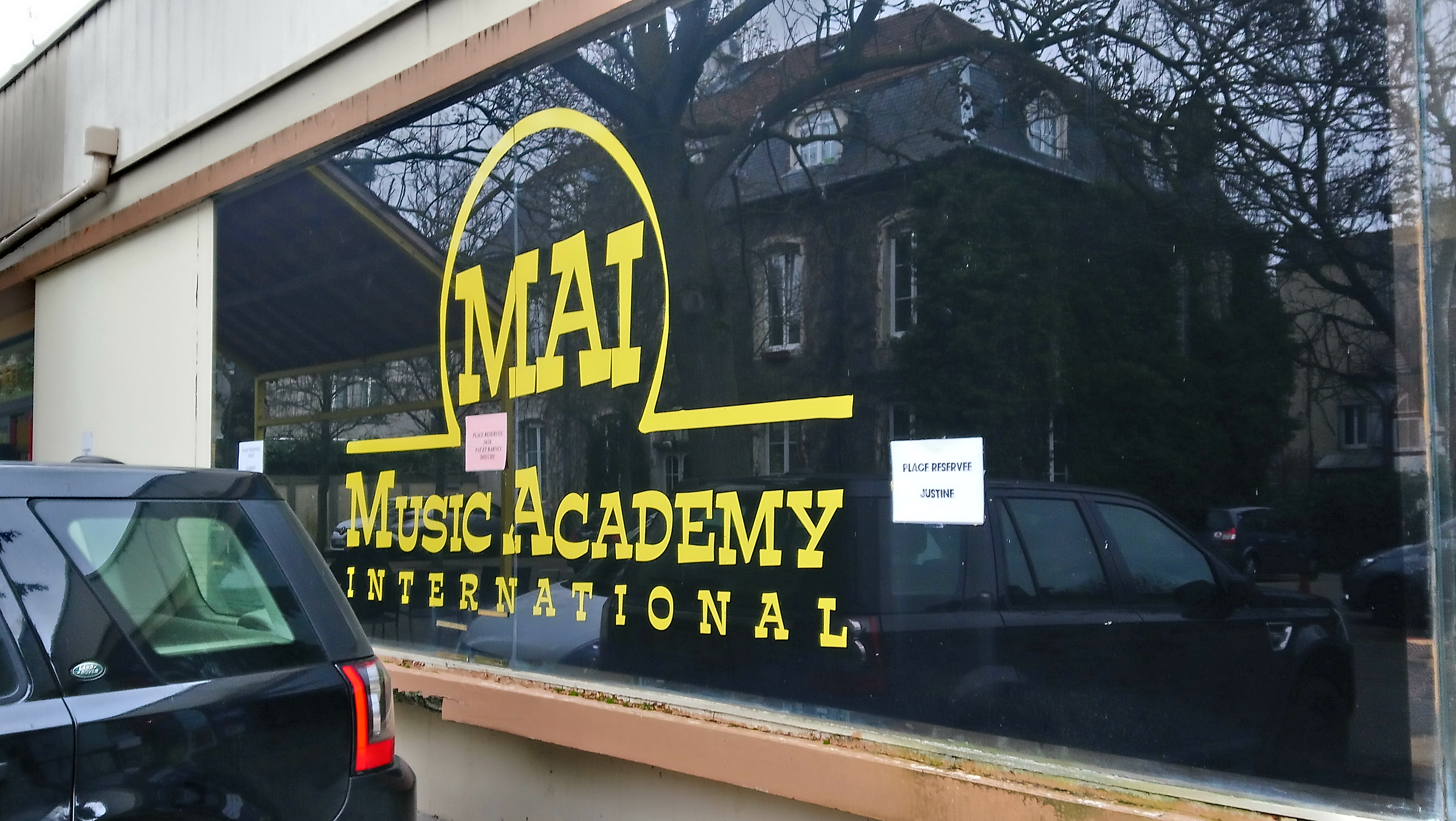 Entrée du centre de formation musical M. A. I. De Nancy